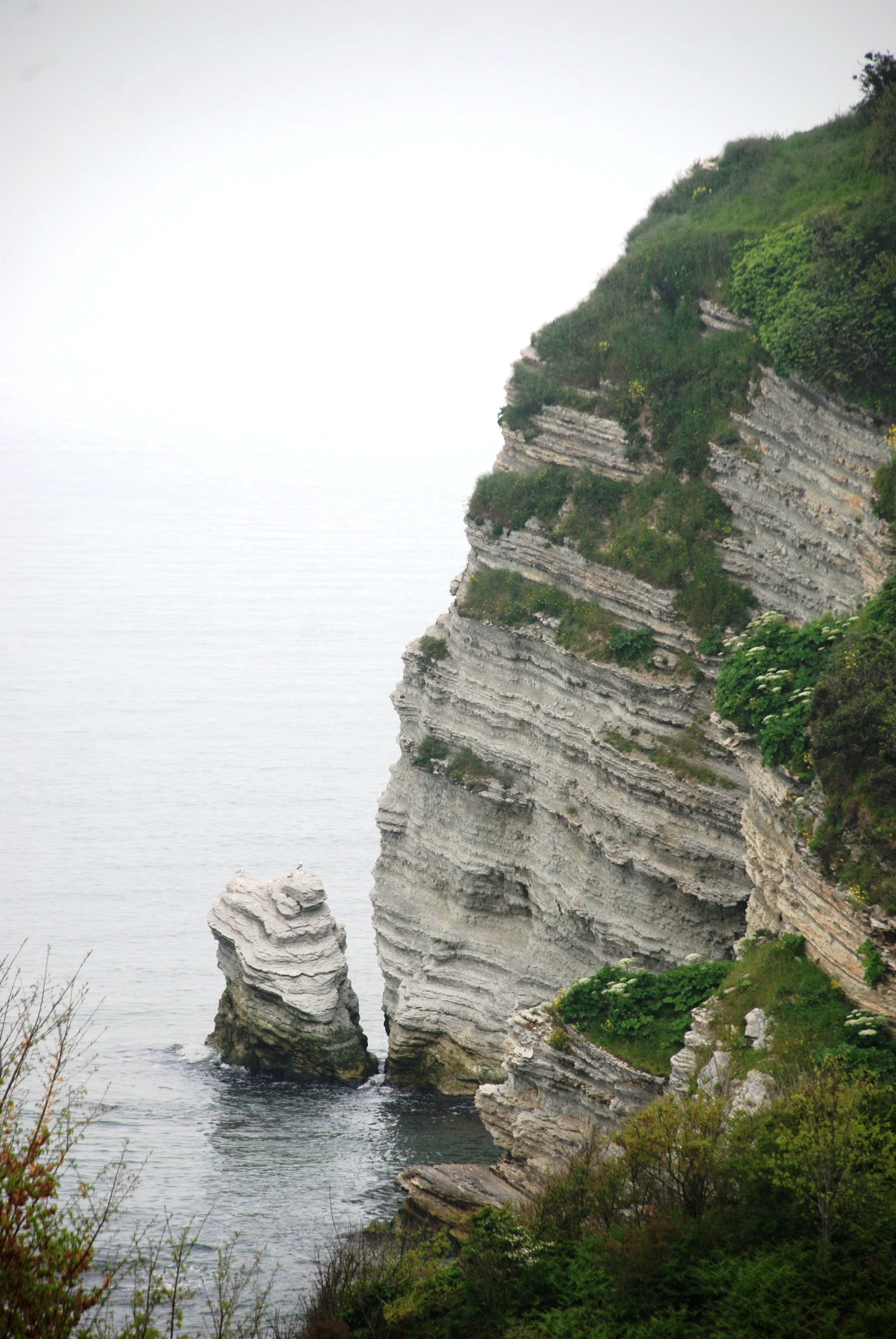 Akçakoca falezleri